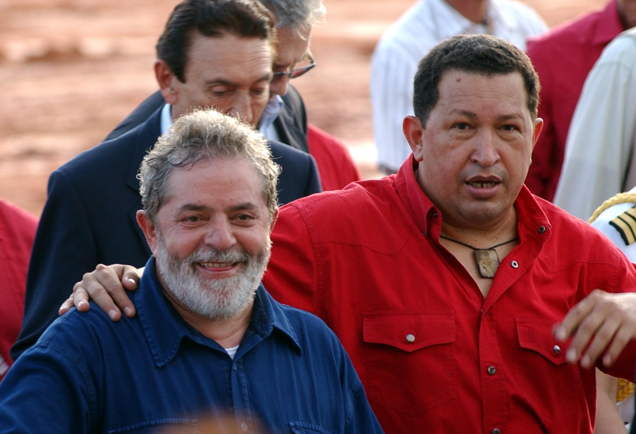 Presidente Lula e o presidente da Venezuela, Hugo Chávez, visitam o canteiro de obras da refinaria Abreu e Lima